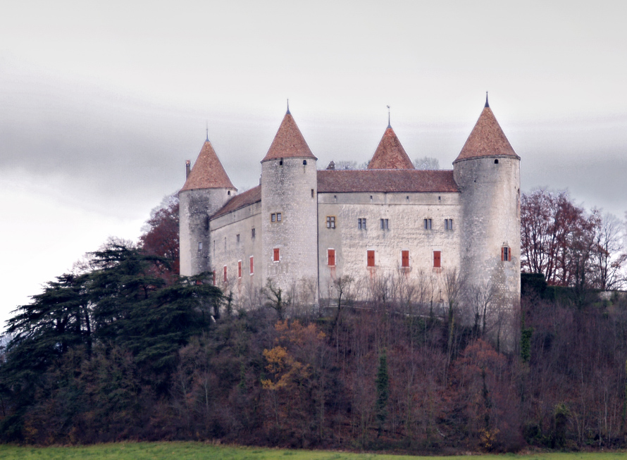 瑞士沃州尚旺城堡，始建于12世纪